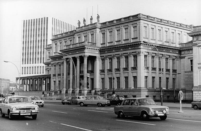 Berlin, Palais Unter den Linden ADN-ZB Senft 23.4.80 Berlin: Zum 35.Jahrestag der Befreiung-Eines der schönsten Bauwerke unter den Linden ist das restaurierte Gästehaus, das frühere Prinzenpalais.Das 1663-64 von Johann Arnold Nering errichtete Palais wurde mehrere Male umgebaut. 1968-69 wurde das zerstörte Bauwerk unter der Leitung von Richard Paulick nach alten Stichen rekonstruiert, da keinerlei Bauunterlagen vorhanden waren.